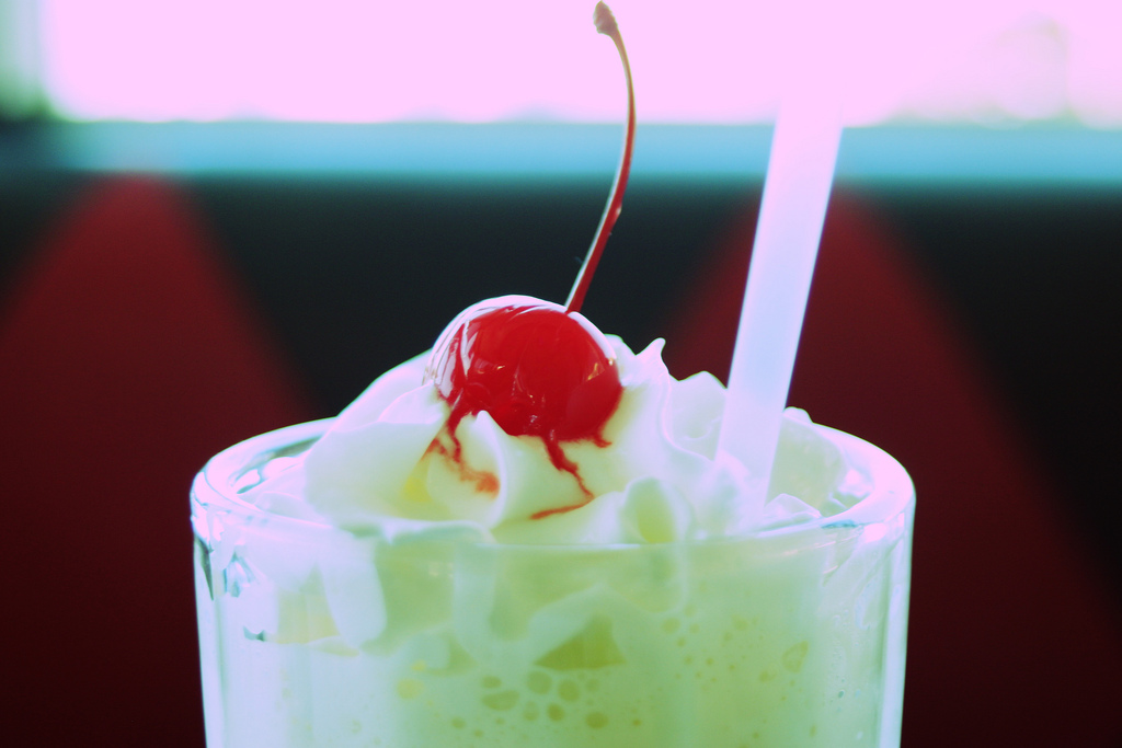 Milkshake